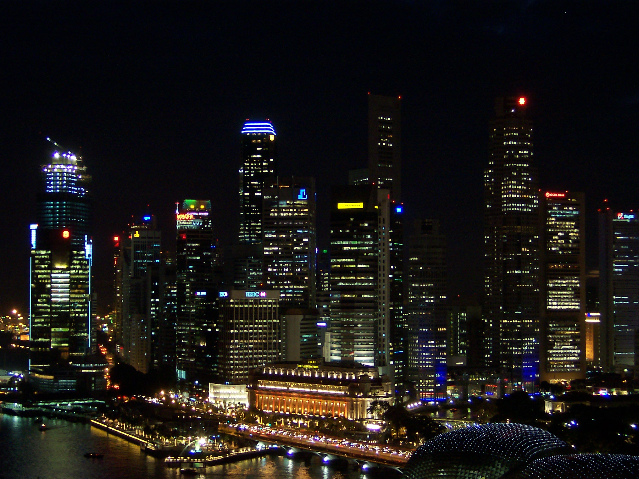 CBD Singapore skyline, night